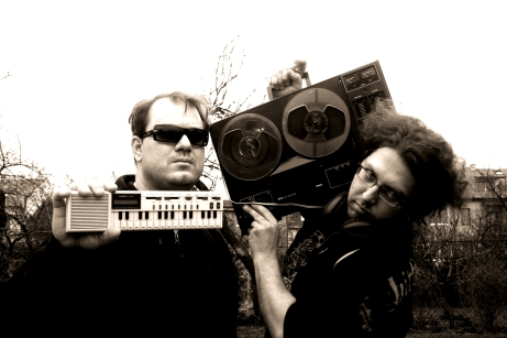 Skupina Bullerbyne v roce 2007